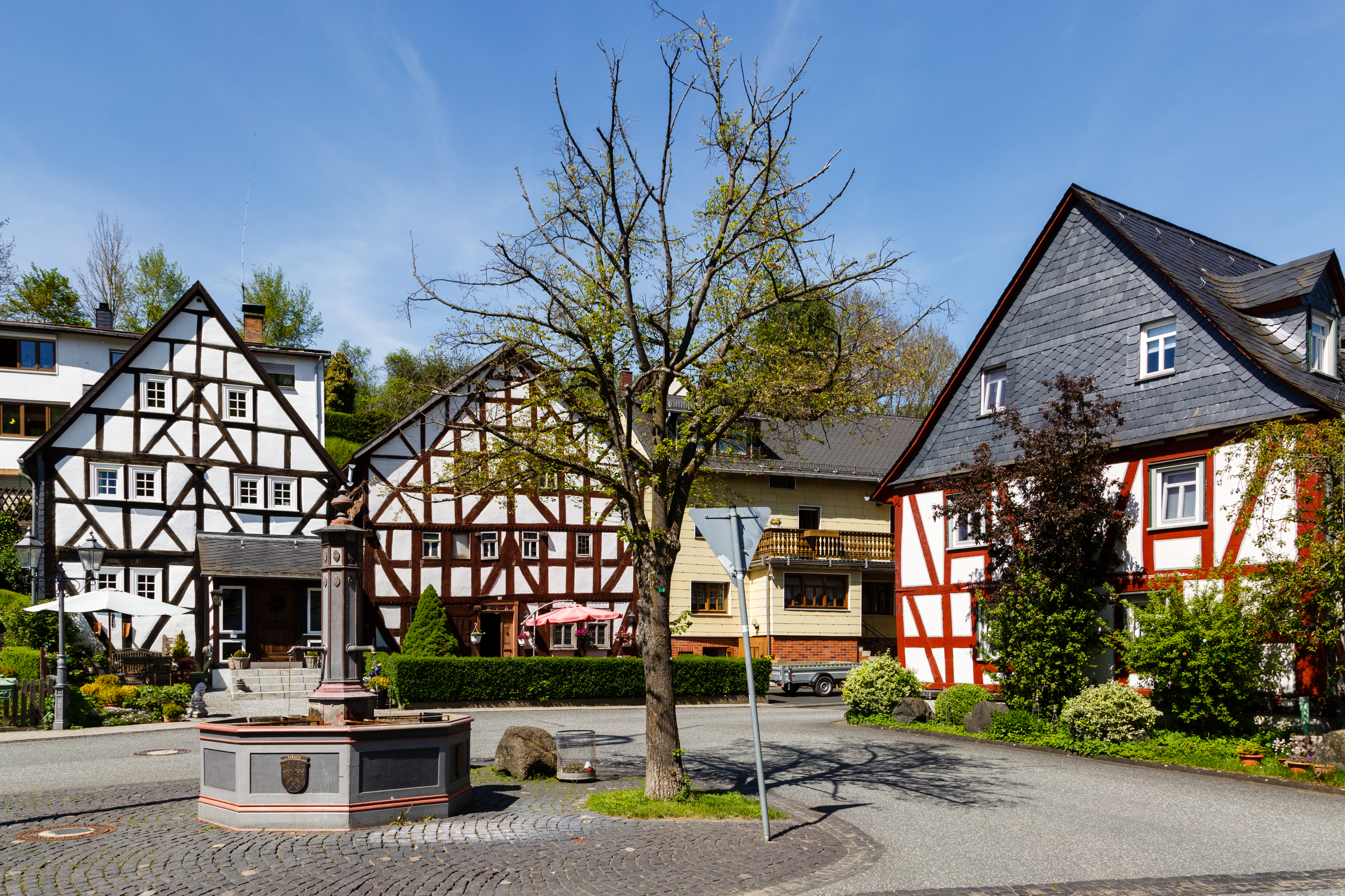 Historischer Ortskern Eibach (Gesamtanlage) 1